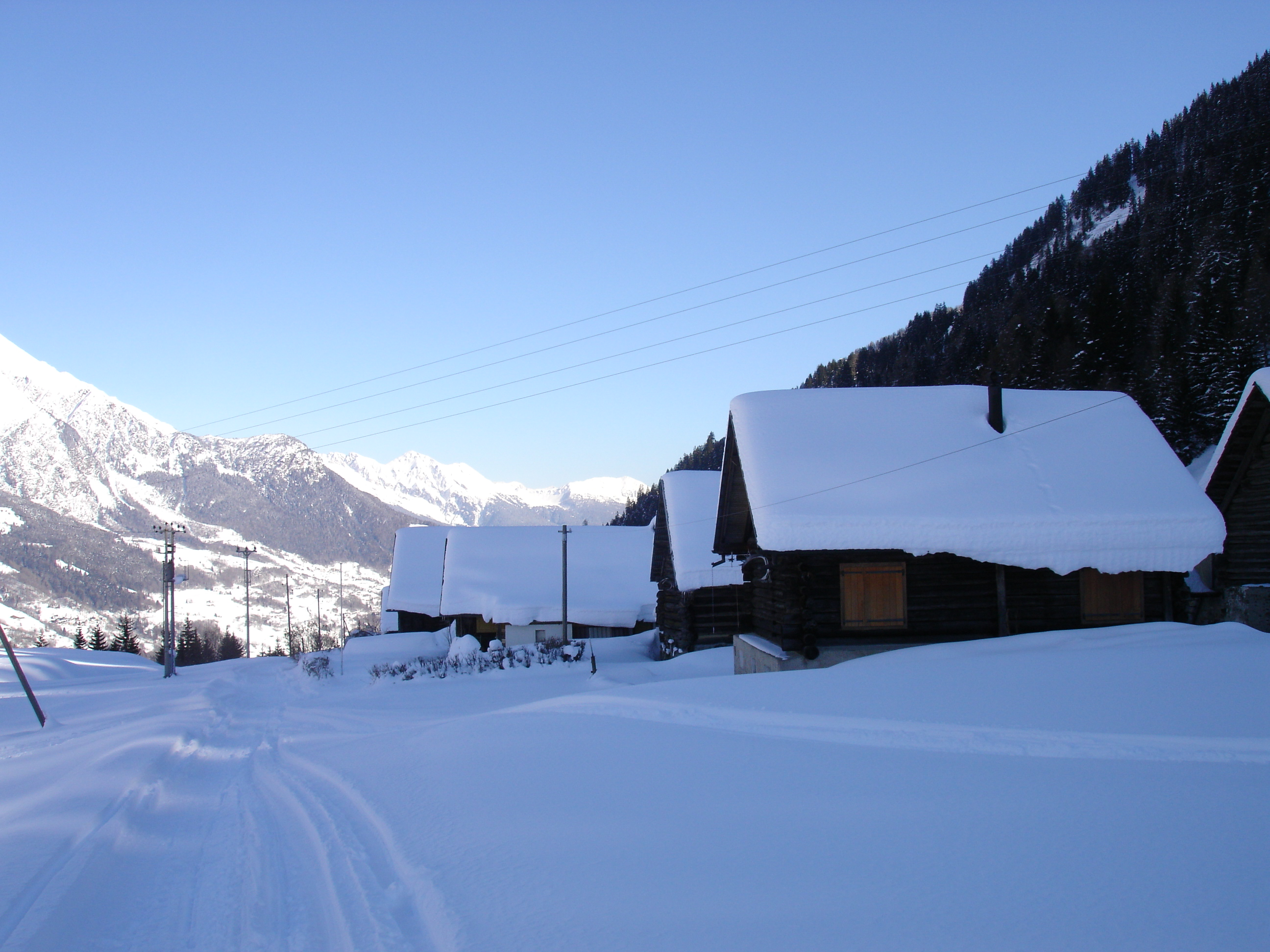 Villaggio di Giof in inverno